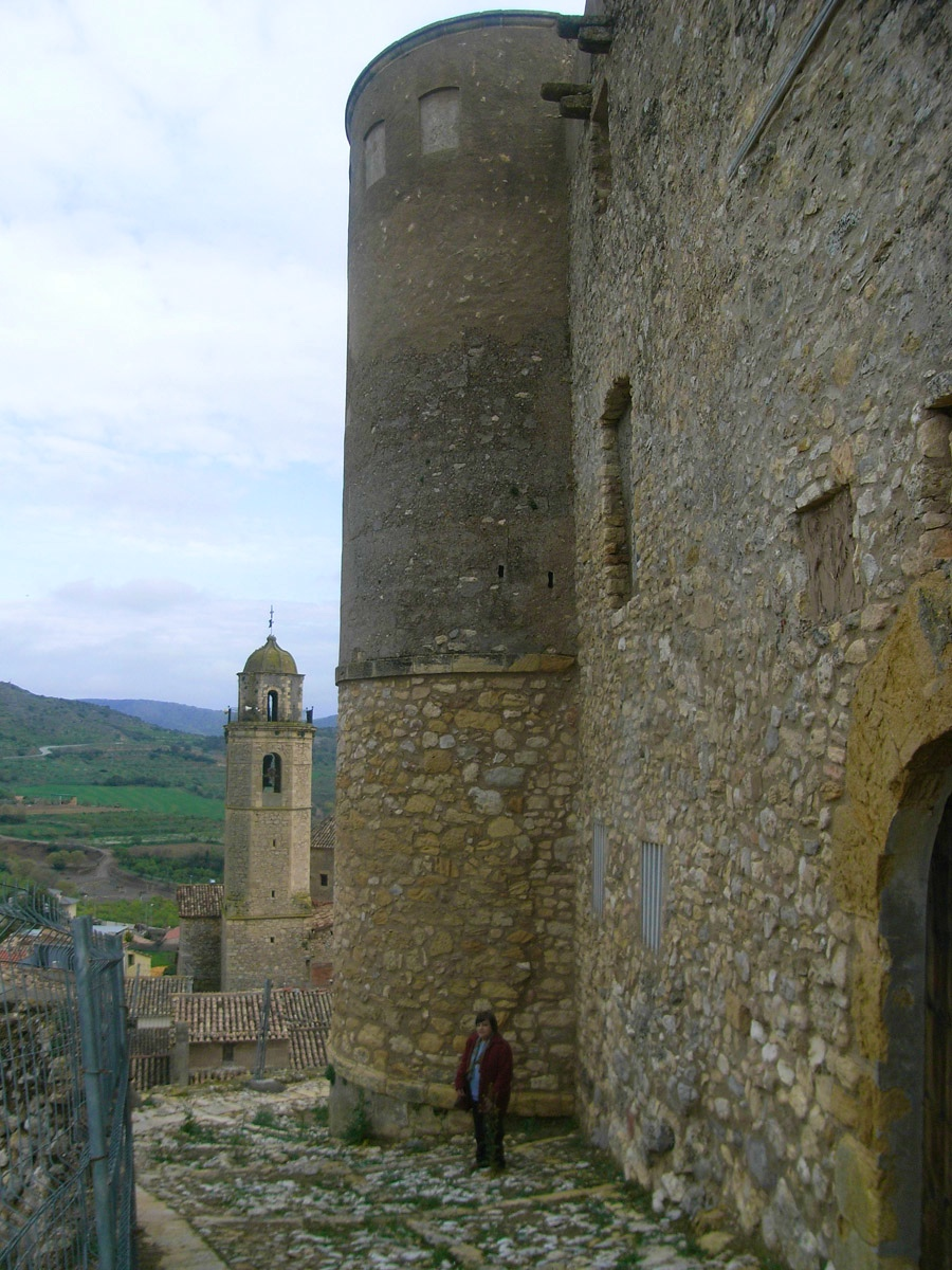 Església i murs del castell d'Os de Balaguer